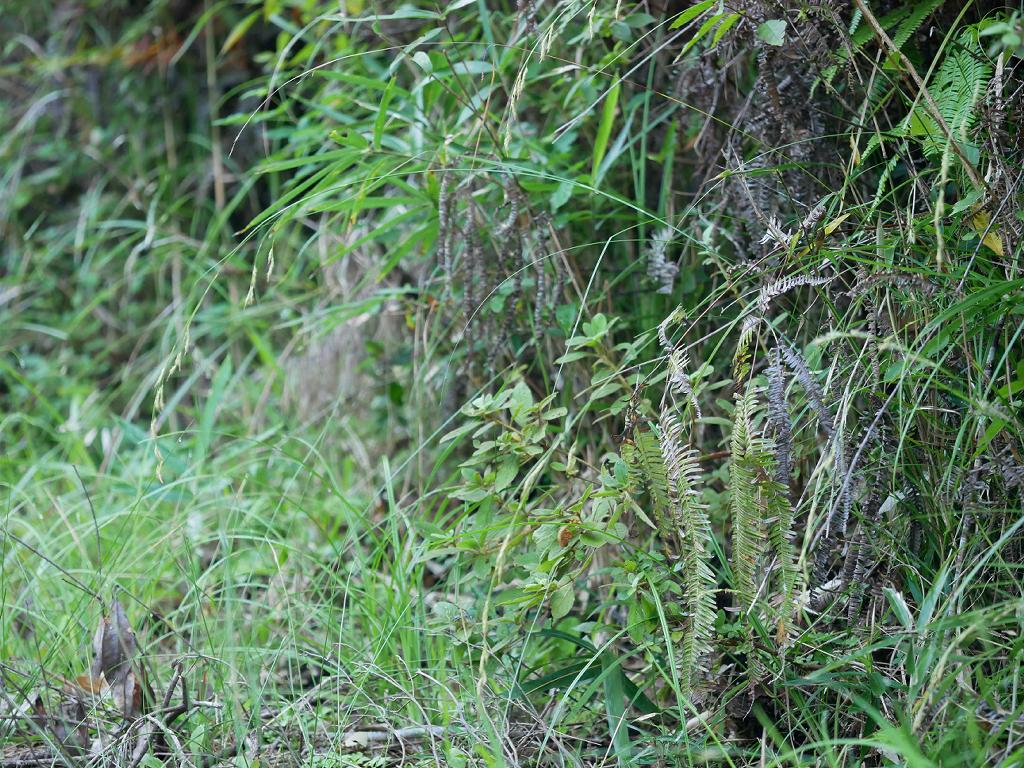 2019/09/30 和歌山県田辺市：Tanabe City. Wakayama Pref. Japan